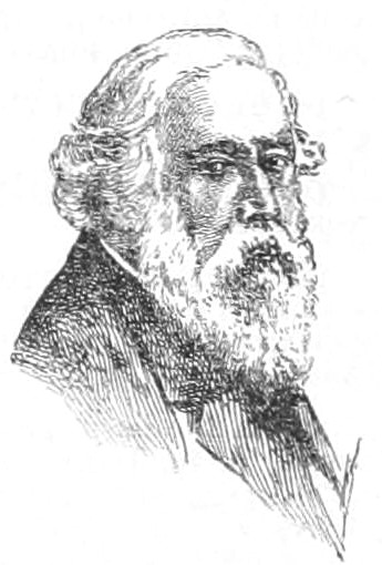 Paul Ritter